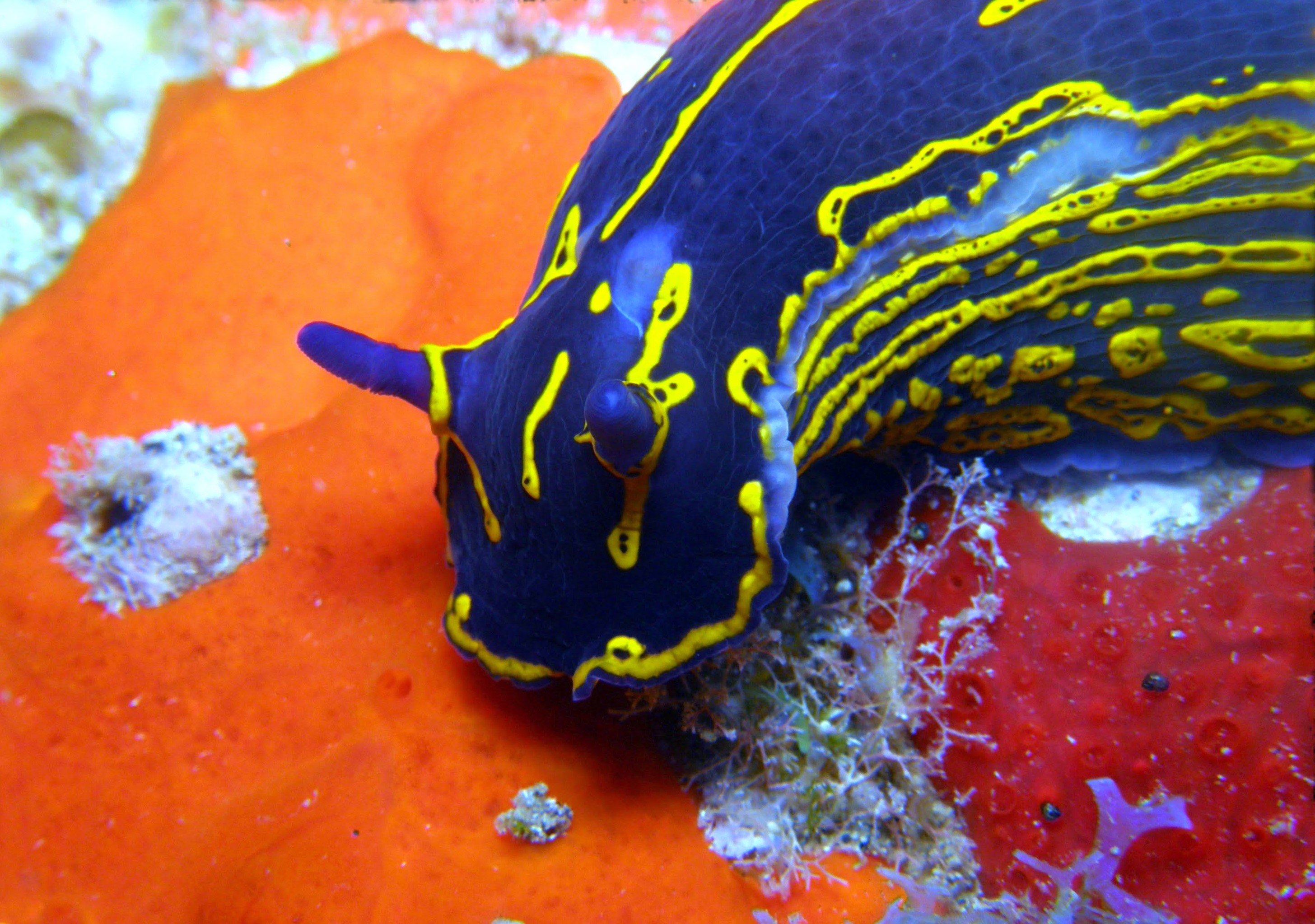 Felimare picta